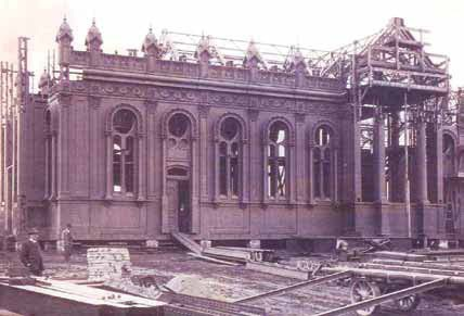 Желязната църква в Цариград в процес на сглобяване